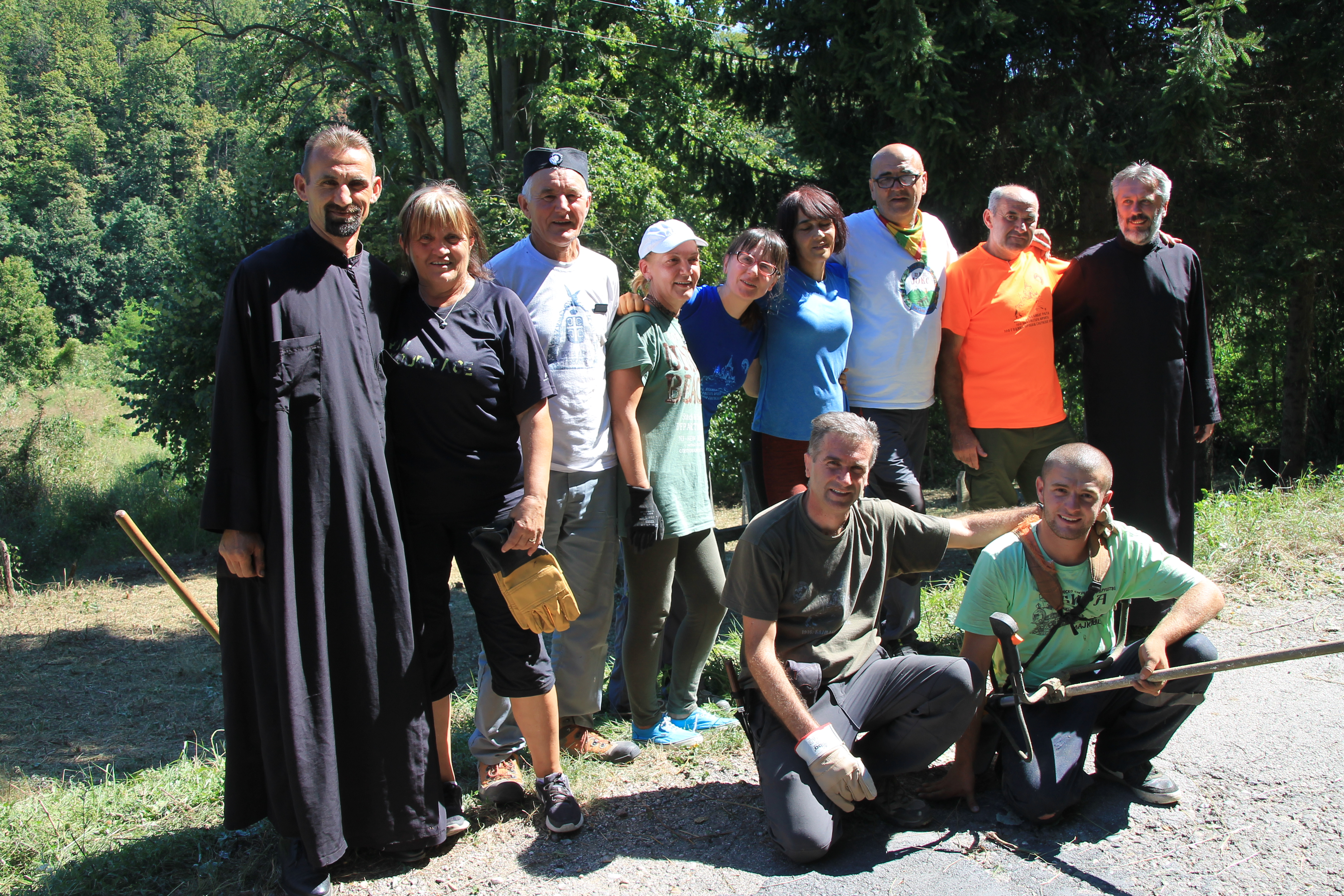 Akcija čišćenja vojničkog groblja u selu Krivaja, na Ceru